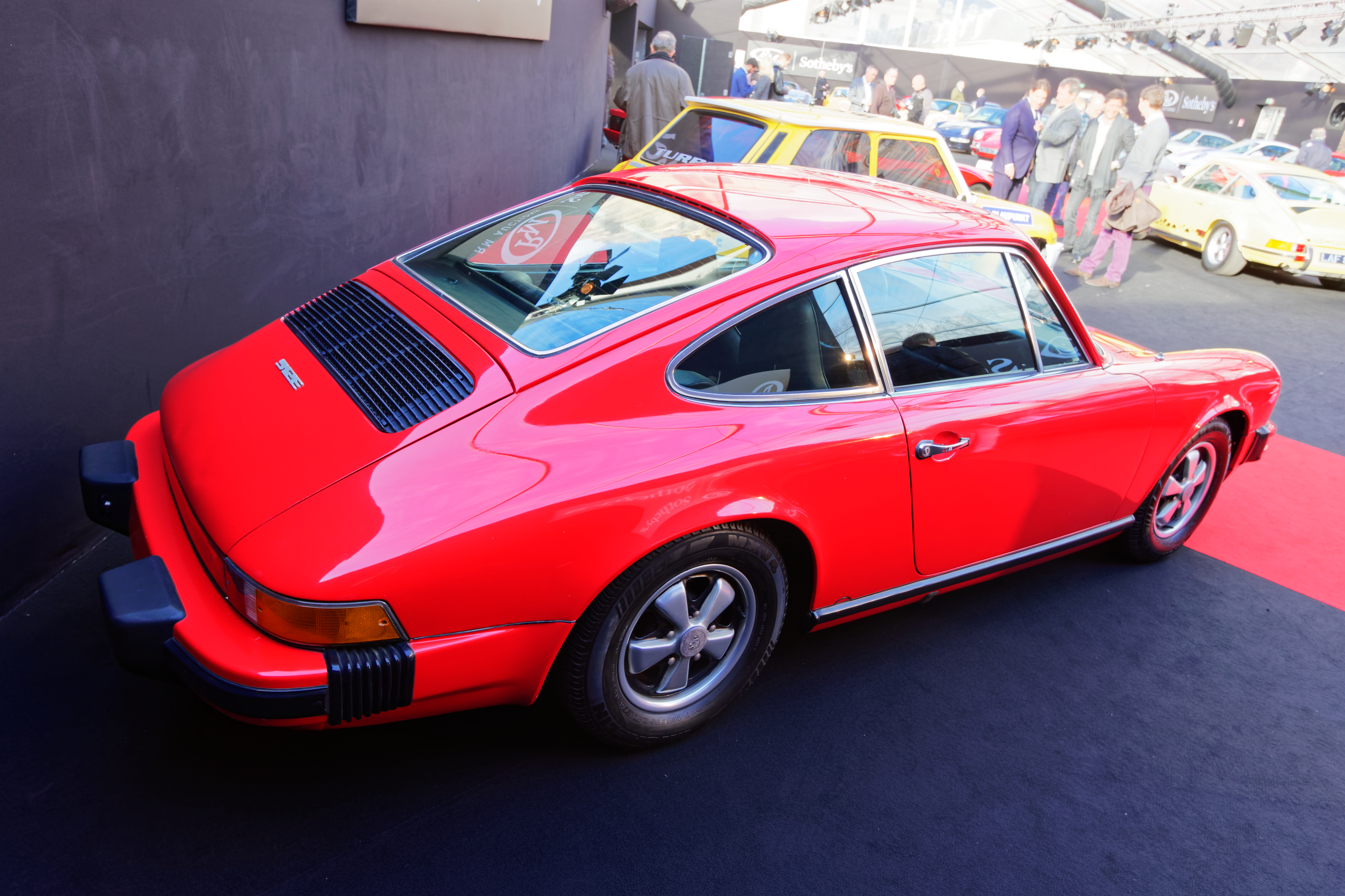 Une Porsche 912 E de 1976 exposée lors de la vente RM Sotheby’s 2017 aux Invalides à Paris.